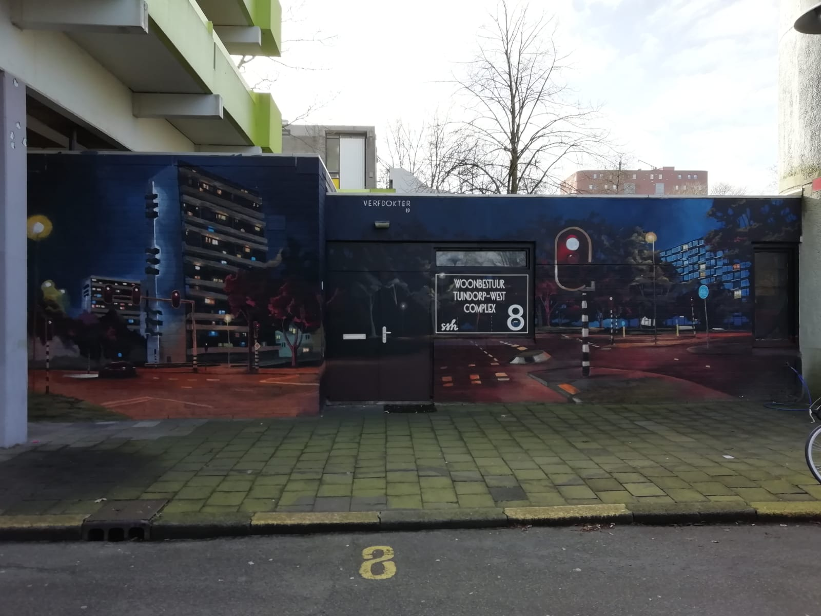 Muurschildering van de Verfdokter op het TWC, Utrecht.